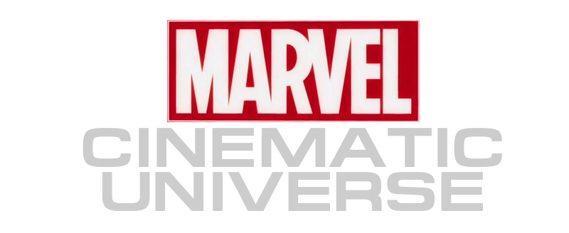 Logo del universo cinematográfico de Marvel